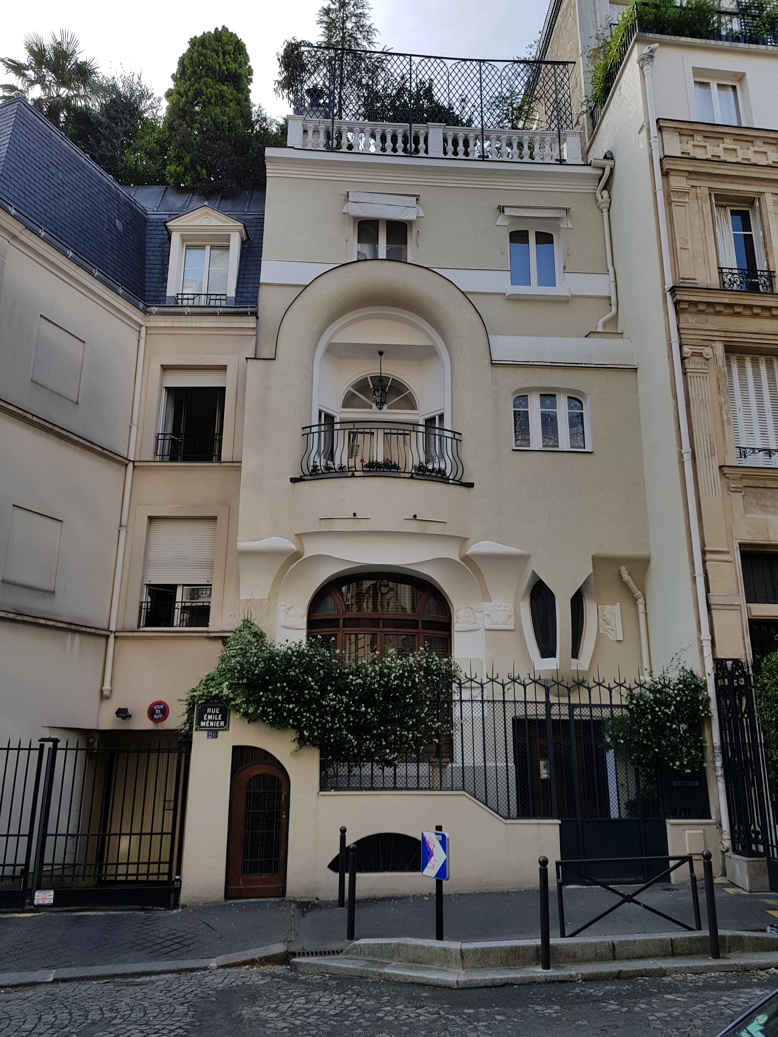 20, rue Emile-Menier, Paris 16e.